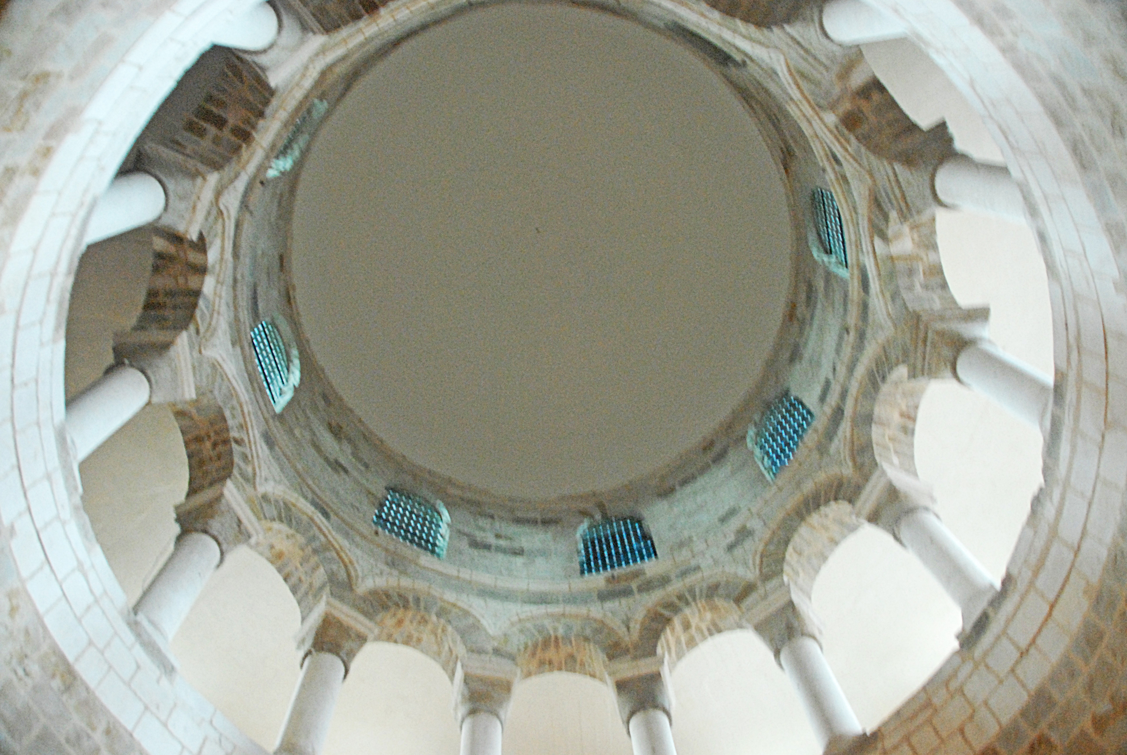 Neuvy_St.-Sépulcre, Rotunde, Arkadenkranz Tribüne. Laterne u. Kuppel